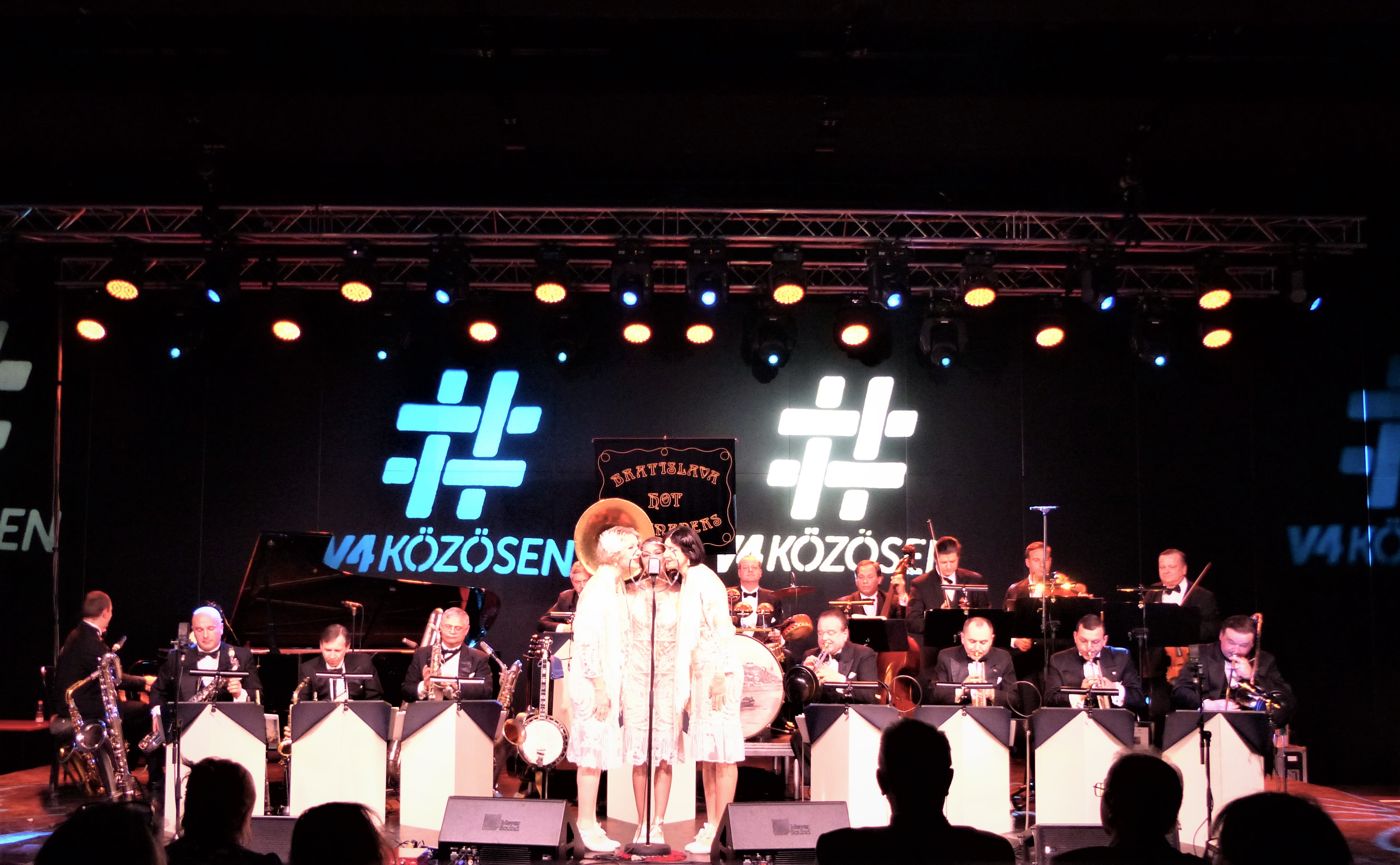 Várkert Bazár, Budapest. Bratislava Hot Serenaders. V4 Concerts. Bratislava Hot Serenaders je unikátny orchester, ktorý sa pod vedením trubkára Juraja Bartoša už od sezóny 1991/1992 špecializuje na hot-jazzovú hudbu 20. a 30. rokov. Orchester patrí medzi svetovú špičku v autentickej interpretácii jazzovej hudby tohto obdobia, dôkazom sú ocenenia z európskych festivalov, ako aj pozitívne ohlasy a kritiky z celého sveta. V rokoch 2014, 2015 a 2016 absolvoval tento popredný slovenský jazzový orchester koncertné turné v Spojenom kráľovstve. Najlepšie skladby hot-jazzového repertoire odzneli vždy na 10 koncertoch v mestách od juhu Anglicka (Exeter, Marlborough, Londýn) cez srdce Británie (Birmingham) až po škótsky Edinburgh a Glasgow. O úspechu oboch letných turné svedčí pripravované turné v júli roku 2018. Orchester tvorí pätnásť hudobníkov, dámske vokálne trio Serenaders Sisters a speváci (štýlovo nazývaní “crooneri”) Dodo Kuriľák a Miloš Stančík. Orchester hrá na autentických nástrojoch z 20. rokov, a vystupuje v na mieru ušitých smokingoch a šatách z tohto noblesného obdobia.